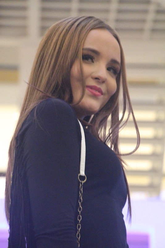 Larissa Manoela-014